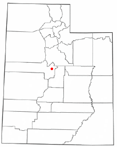 Localización de Nephi, Utah